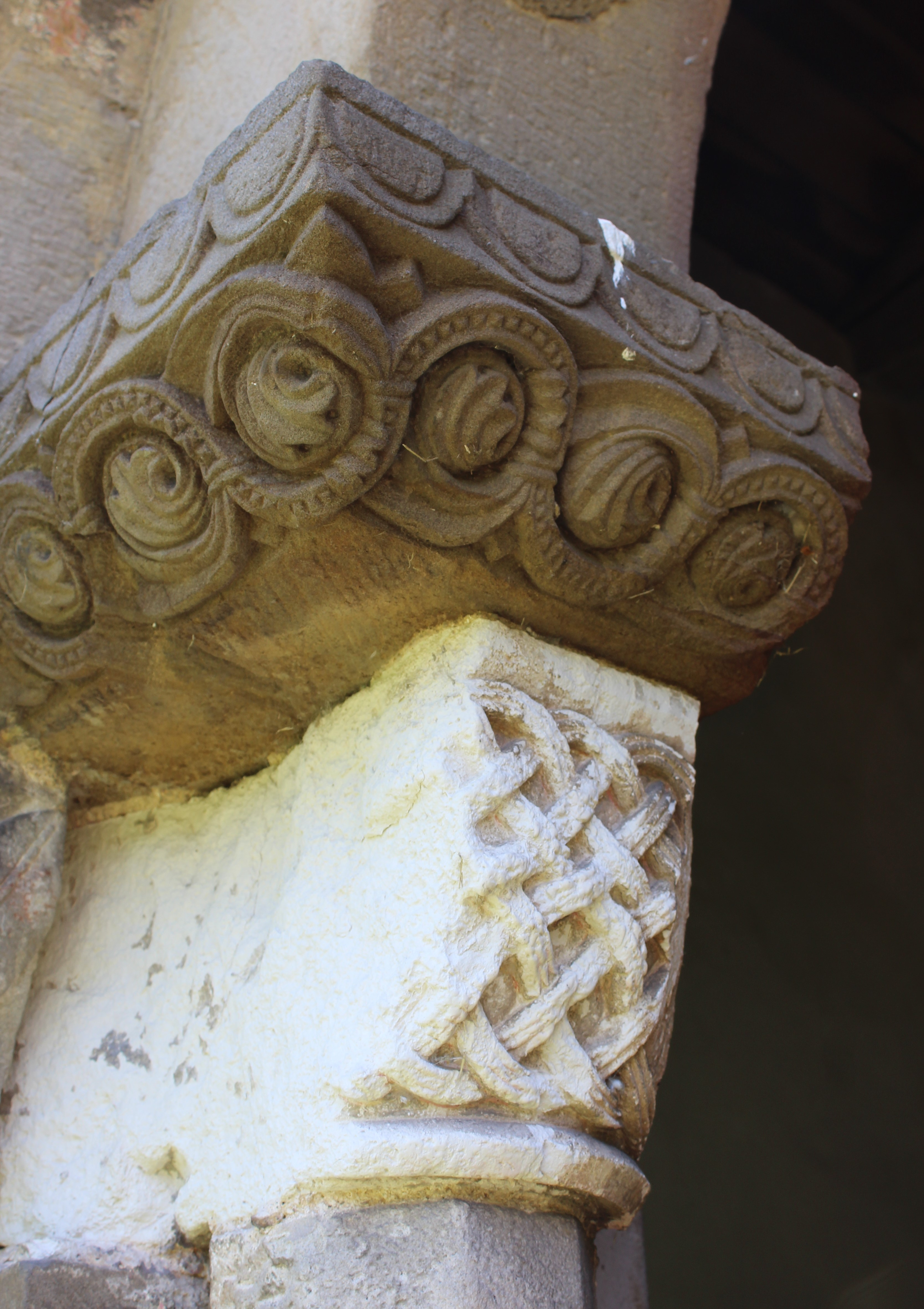 Capitel pórtico principal interior, zona derecha